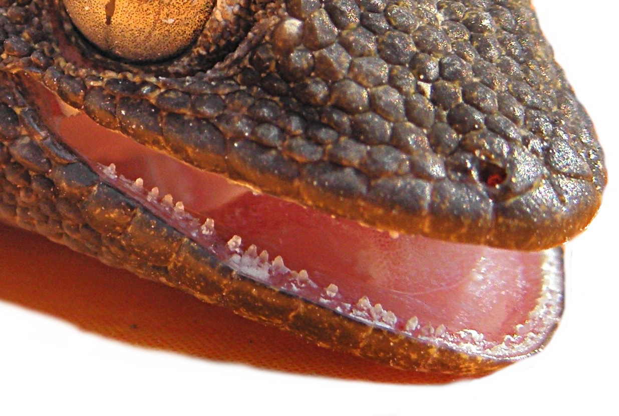 Gueule et dents du gecko photographié à Nice (France)